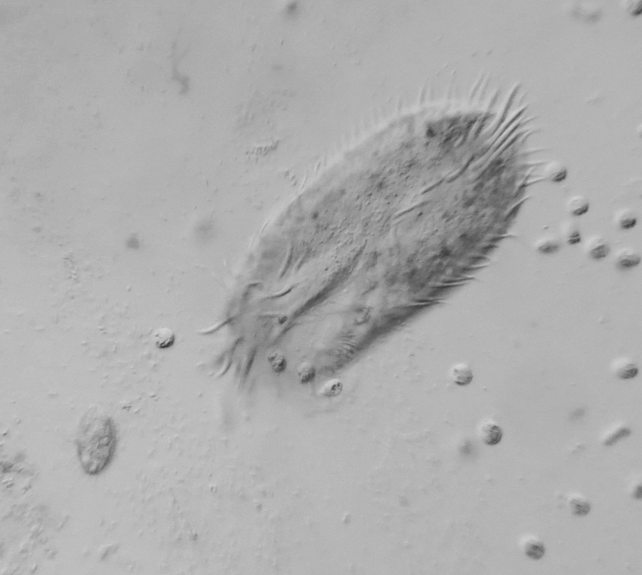 Oxytricha hymenostoma - 160x